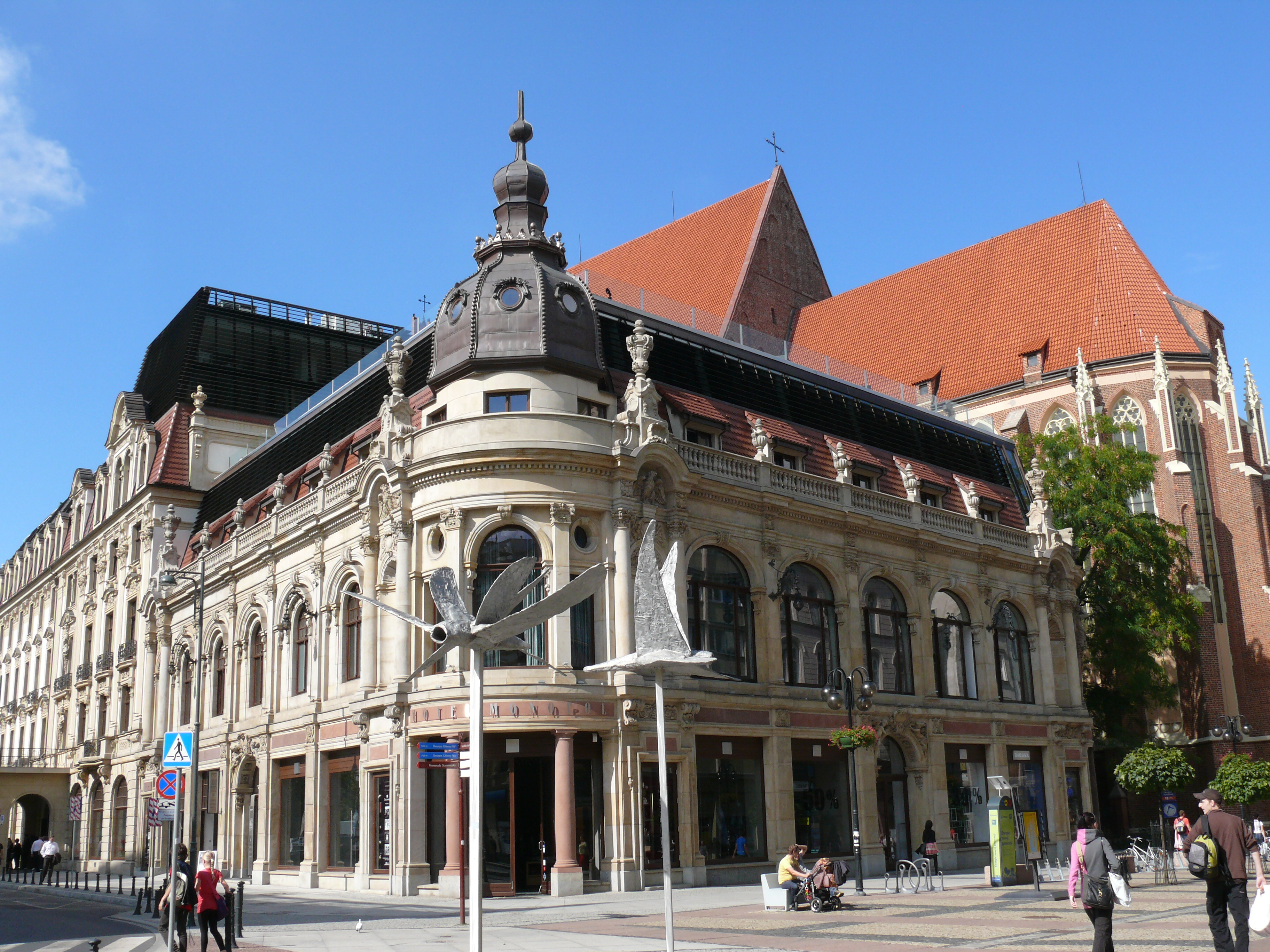 Wrocław Stare Miasto. ul. Modrzejewskiej 2 (Świdnicka 33) - Hotel Monopol wraz z działką 25/1 (zabytek nr 259/431/Wm)